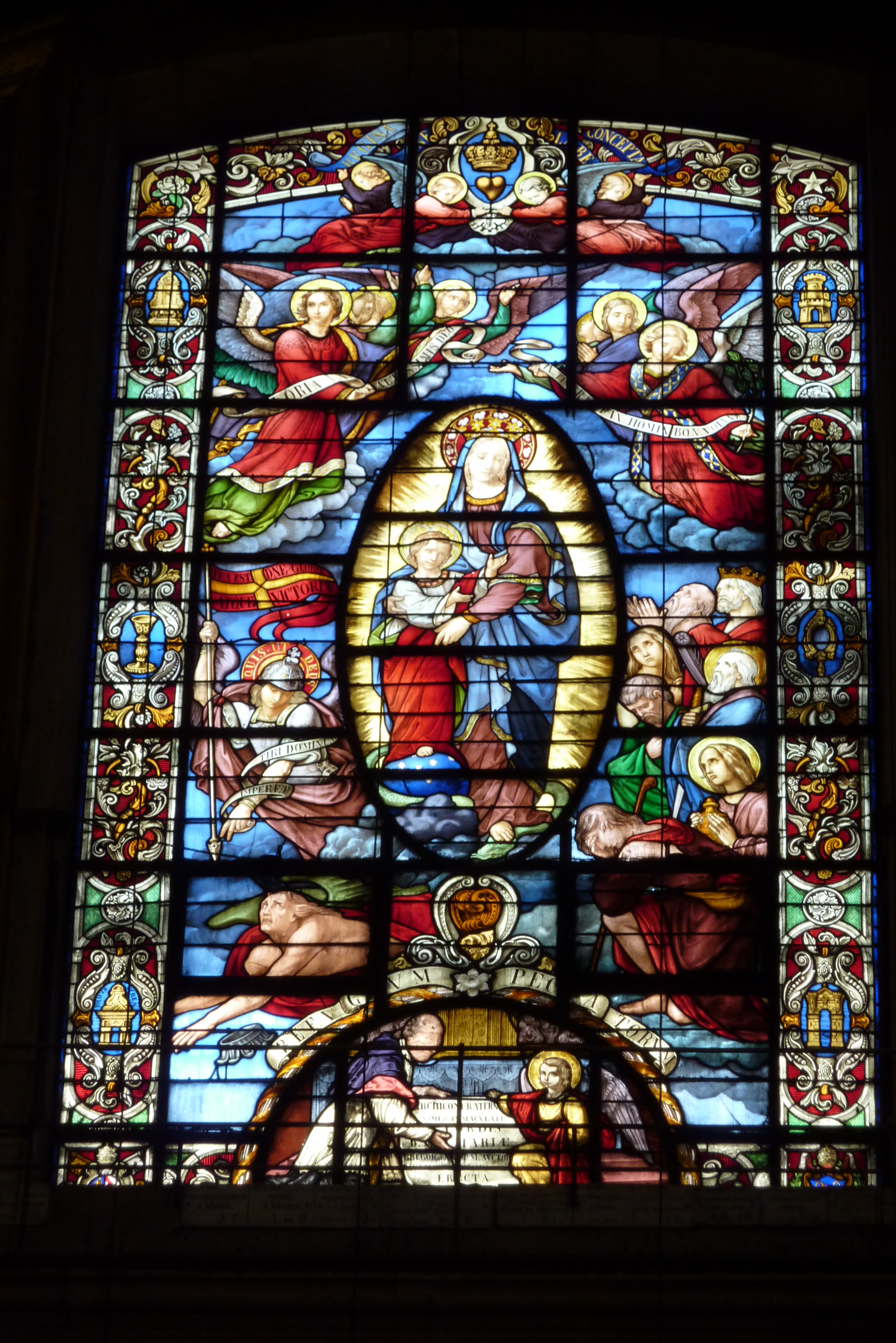 Bleiglasfenster in der Kirche Notre-Dame-des-Victoires in Paris, Darstellung: Madonna und Kind